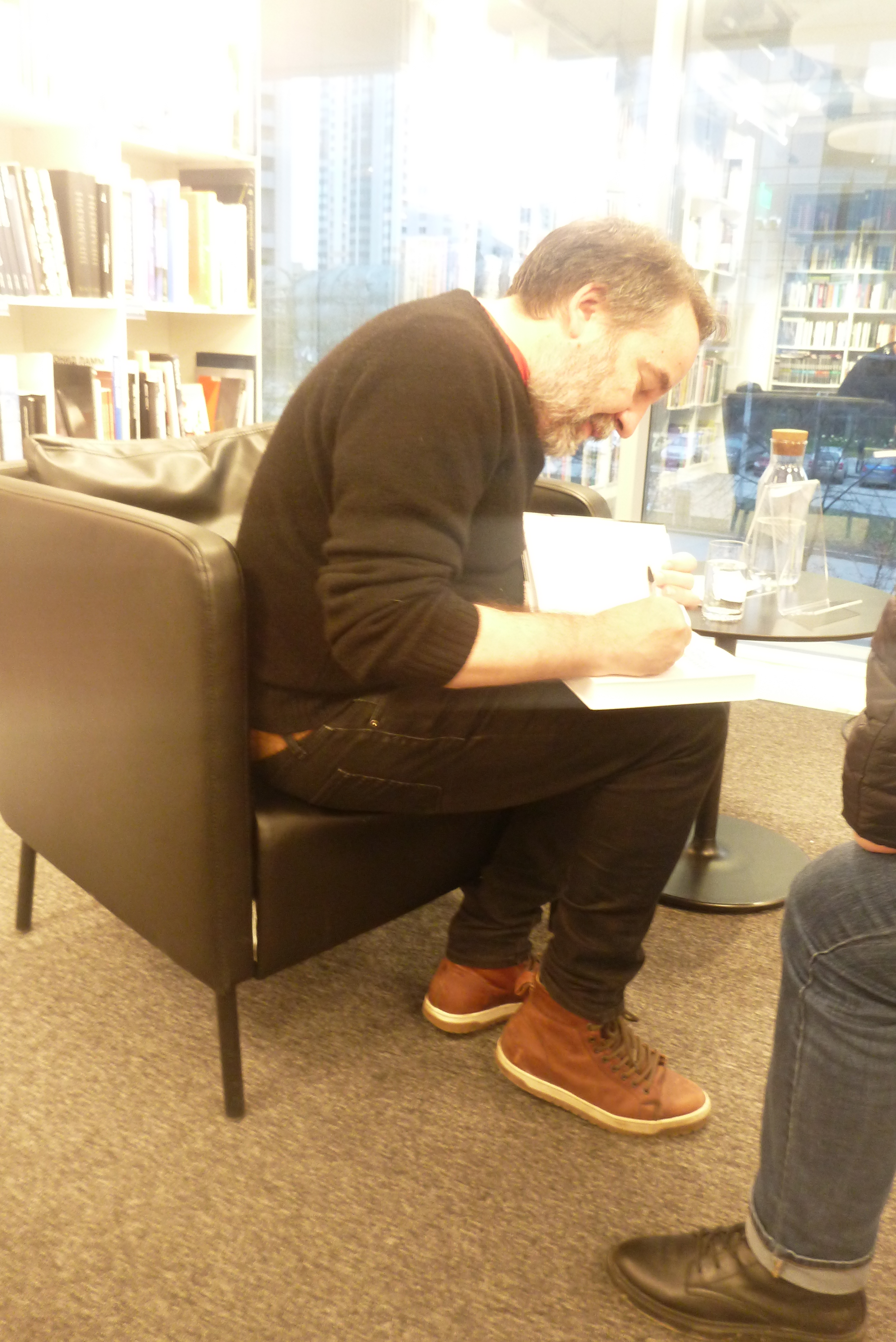 Олег Андершанович Лекманов в Екатеринбурге подписывает свою книгу в Ельцин-центре. 21 октября 2018 года